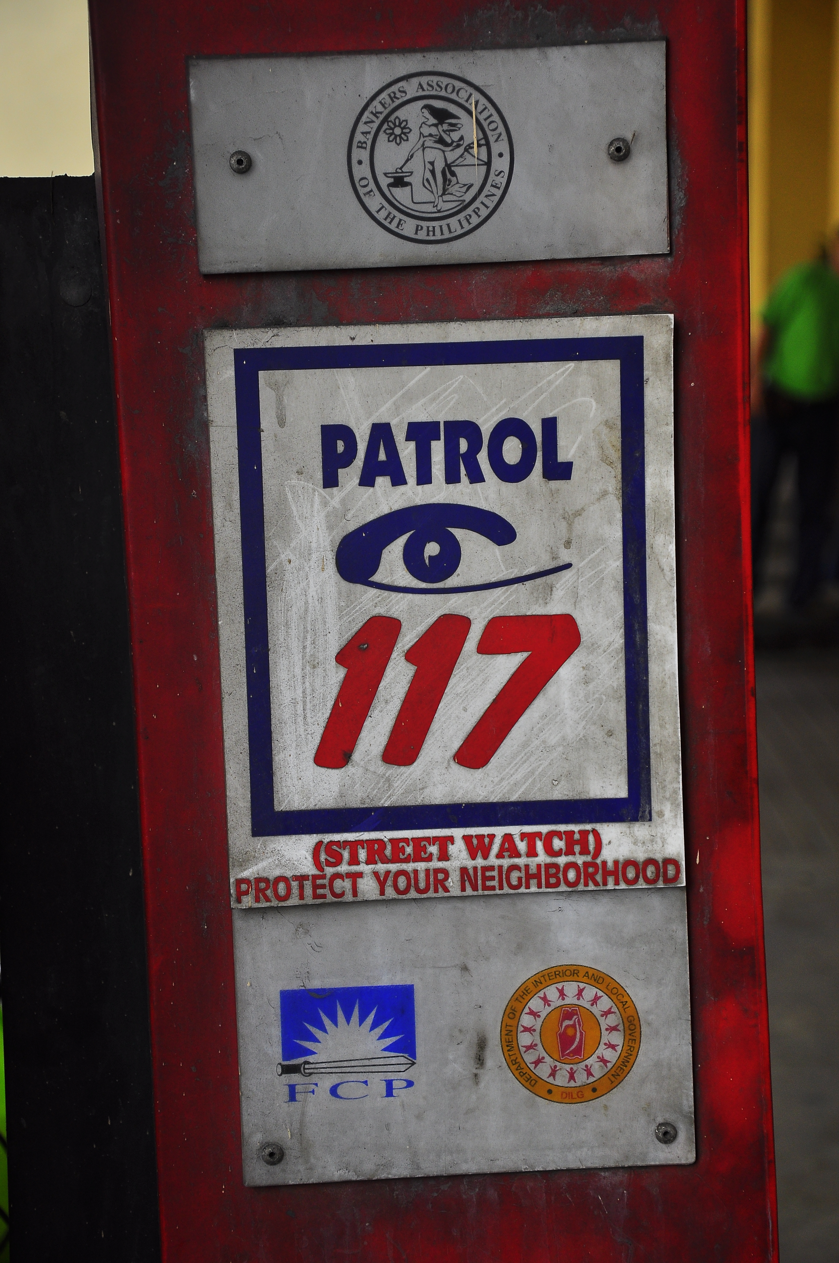 Patrol 117 sign in Manila, Philippines